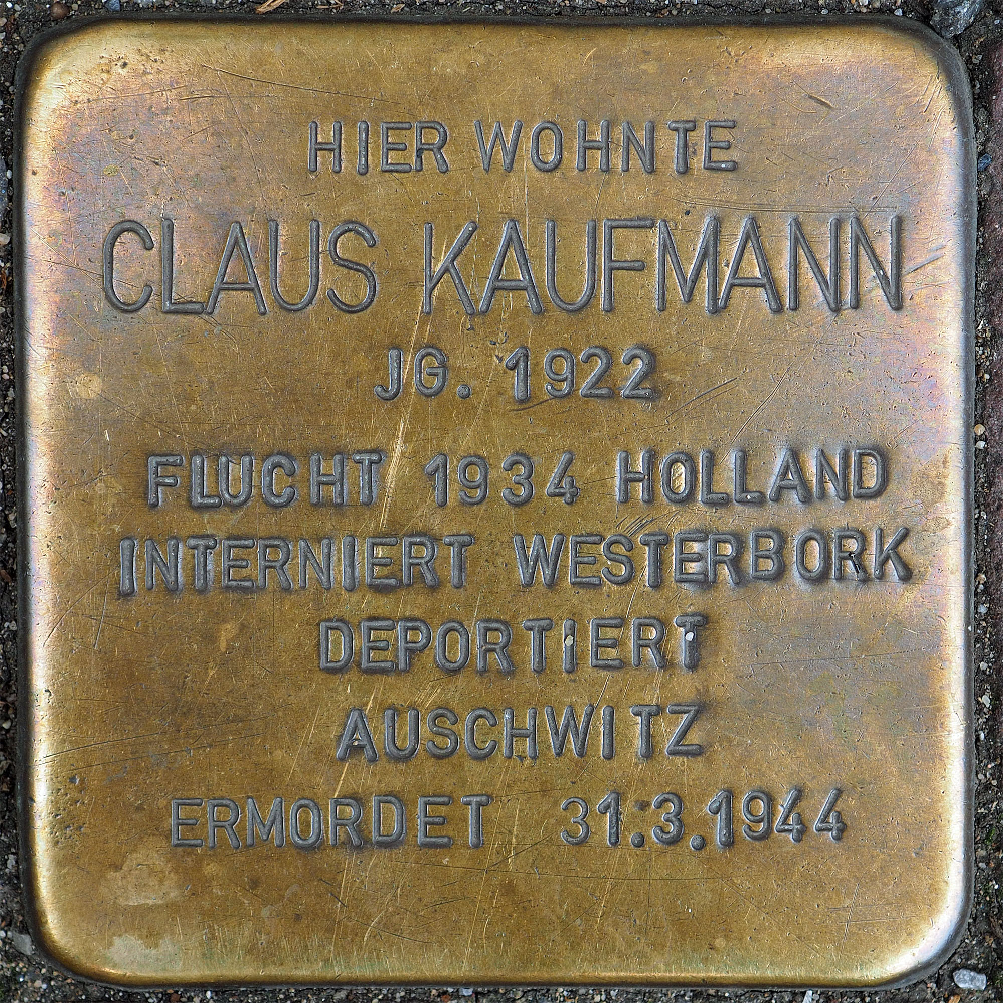 Stolperstein Geldern Hartstraße 2 Claus Kaufmann